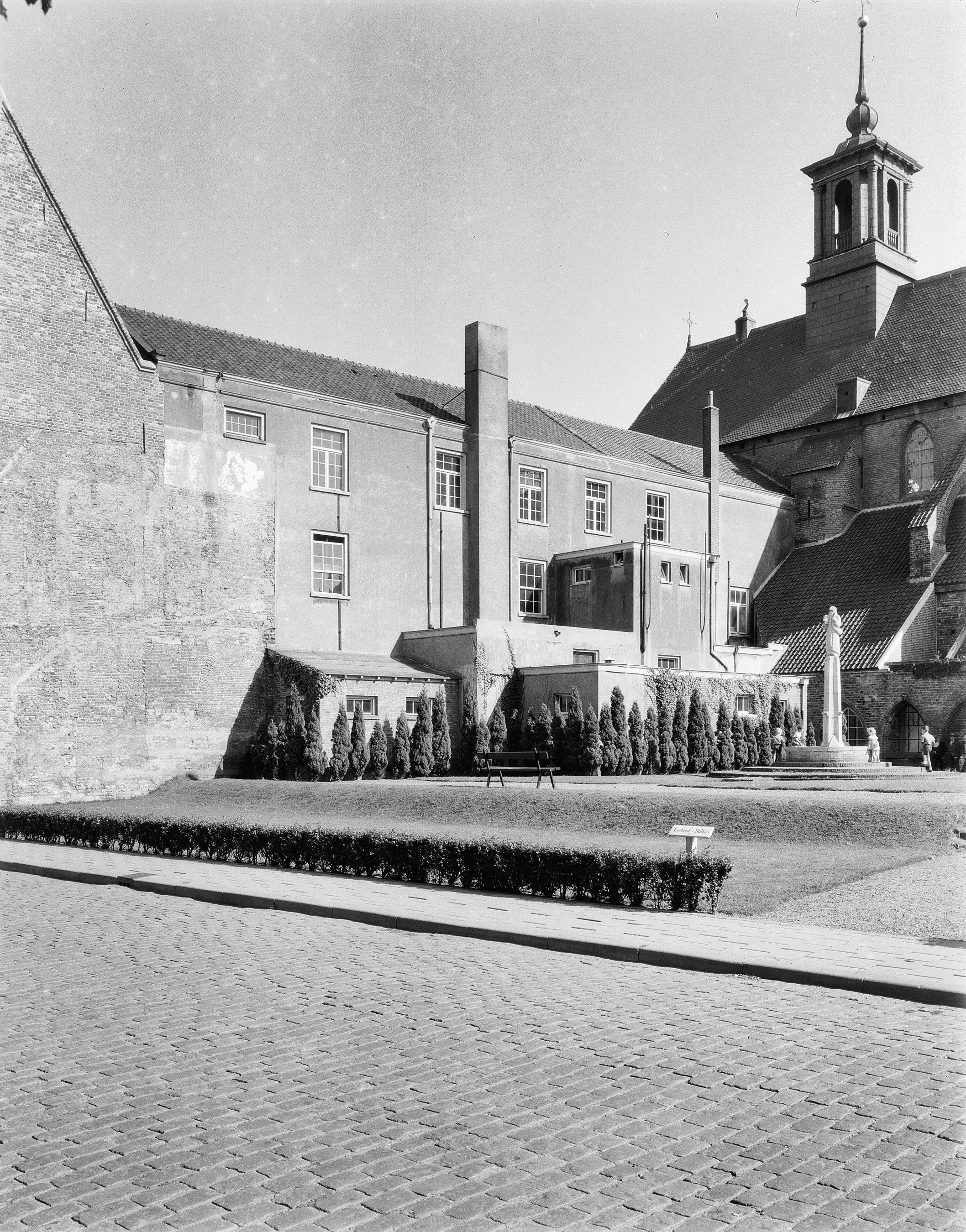 Kloostergebouwen, thans onder meer Stedelijk Museum: Westzijde van de zijvleugel van het Broederenklooster te Zutphen